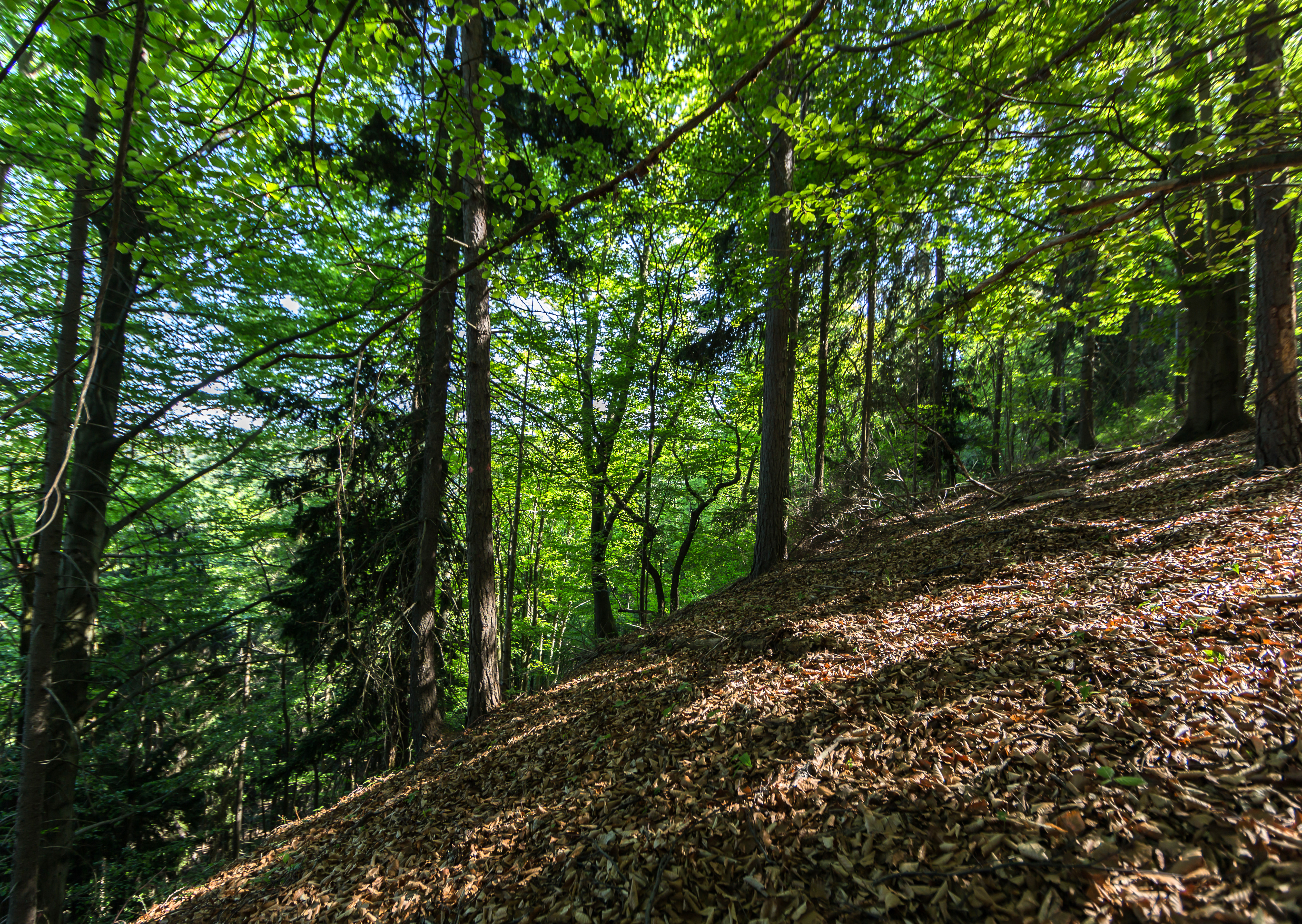 NSG Dissau und Steinberg Nr. 157 WDPA ID 14499 Mischwald am Nordhang Steinberg DE-TH